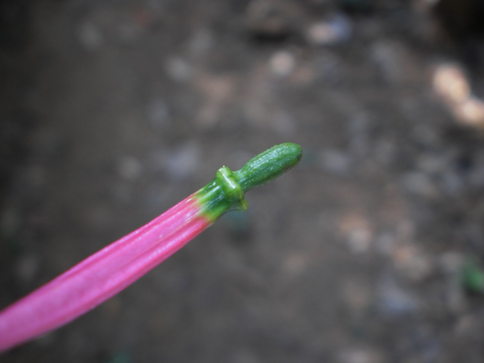 ഇത്തിക്കണ്ണിയുടെ പൂവ്